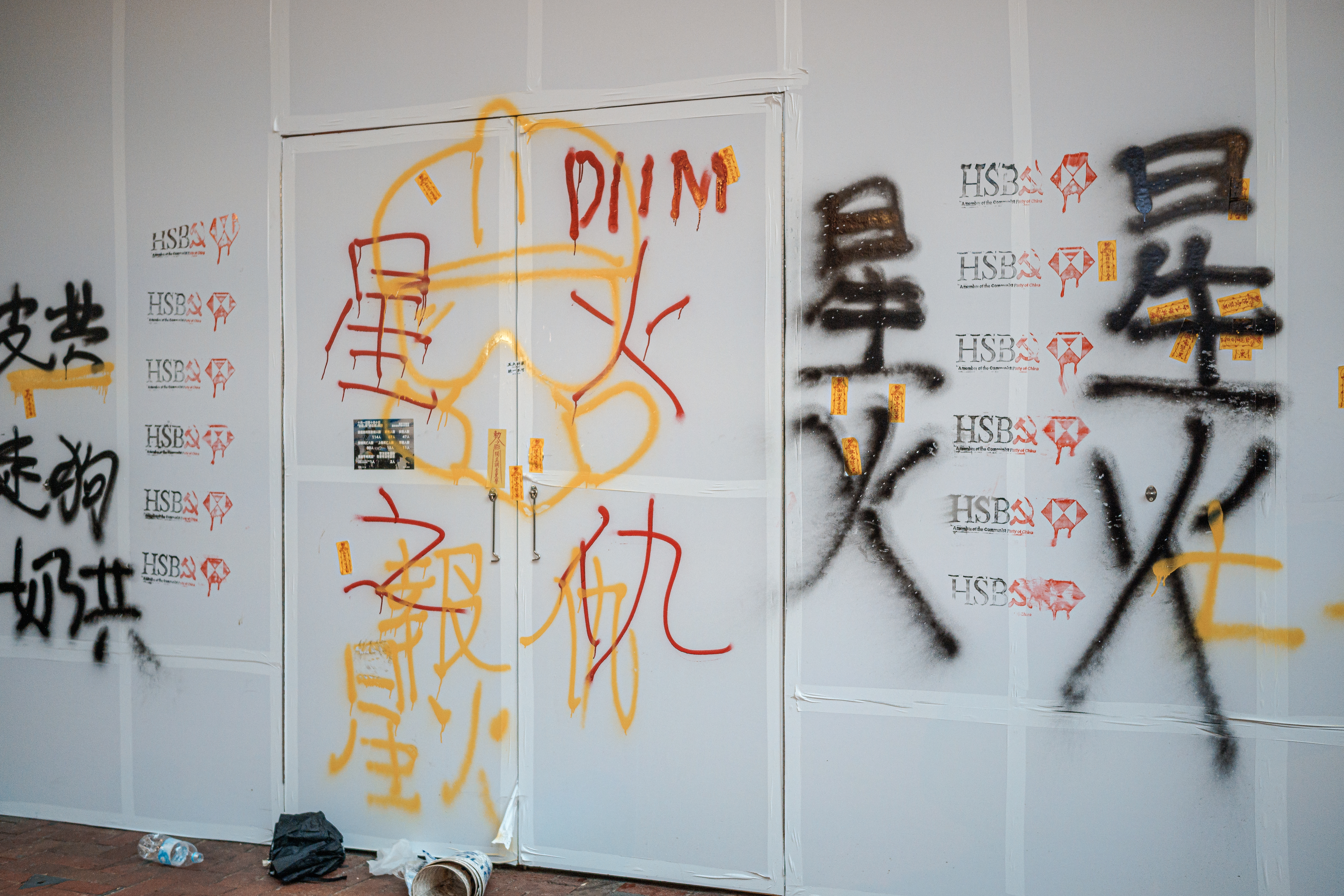 SDIM0582